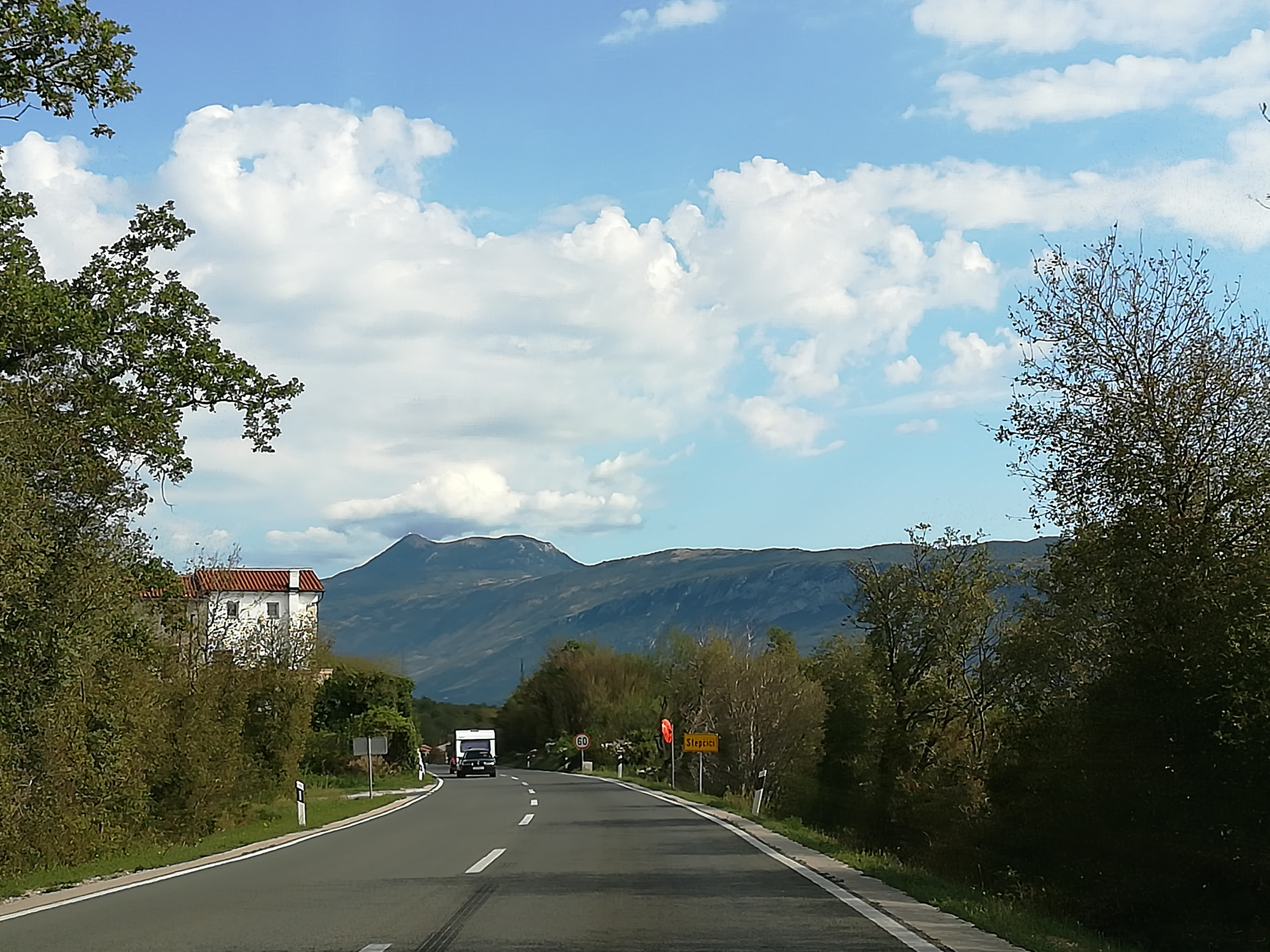 Stepčići, Kršan